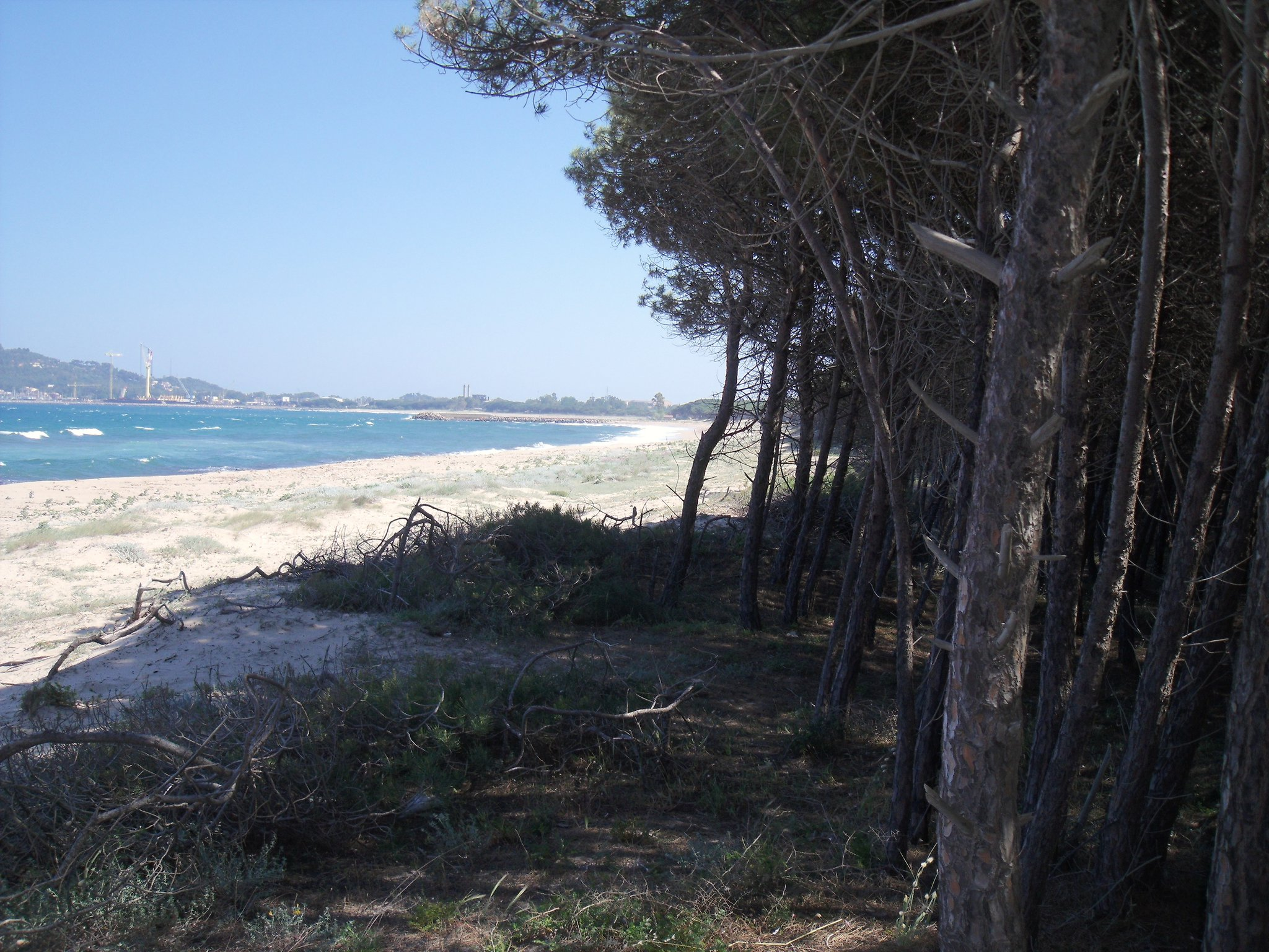 Spiaggia di Lotzorai, arenile di Isula Manna